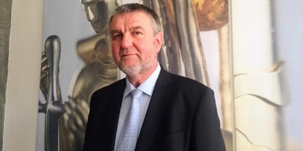 Petr Pleva.